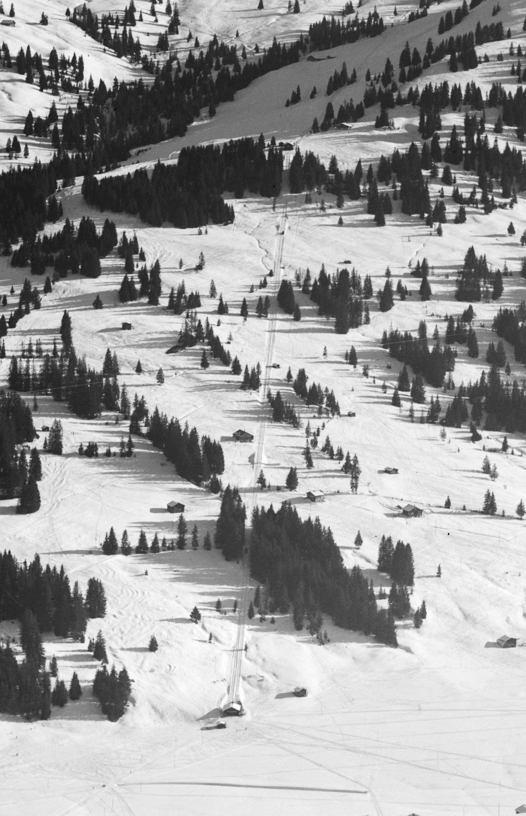 Spur des Funi-Schlittens (bis etwa 1984 in Betrieb), eine Erfindung aus dem Saanenland, die ab den 1930er-Jahren an verschiedenen Orten mit Erfolg den Wintersport belebte: eine Art Standseilbahn auf Kufen